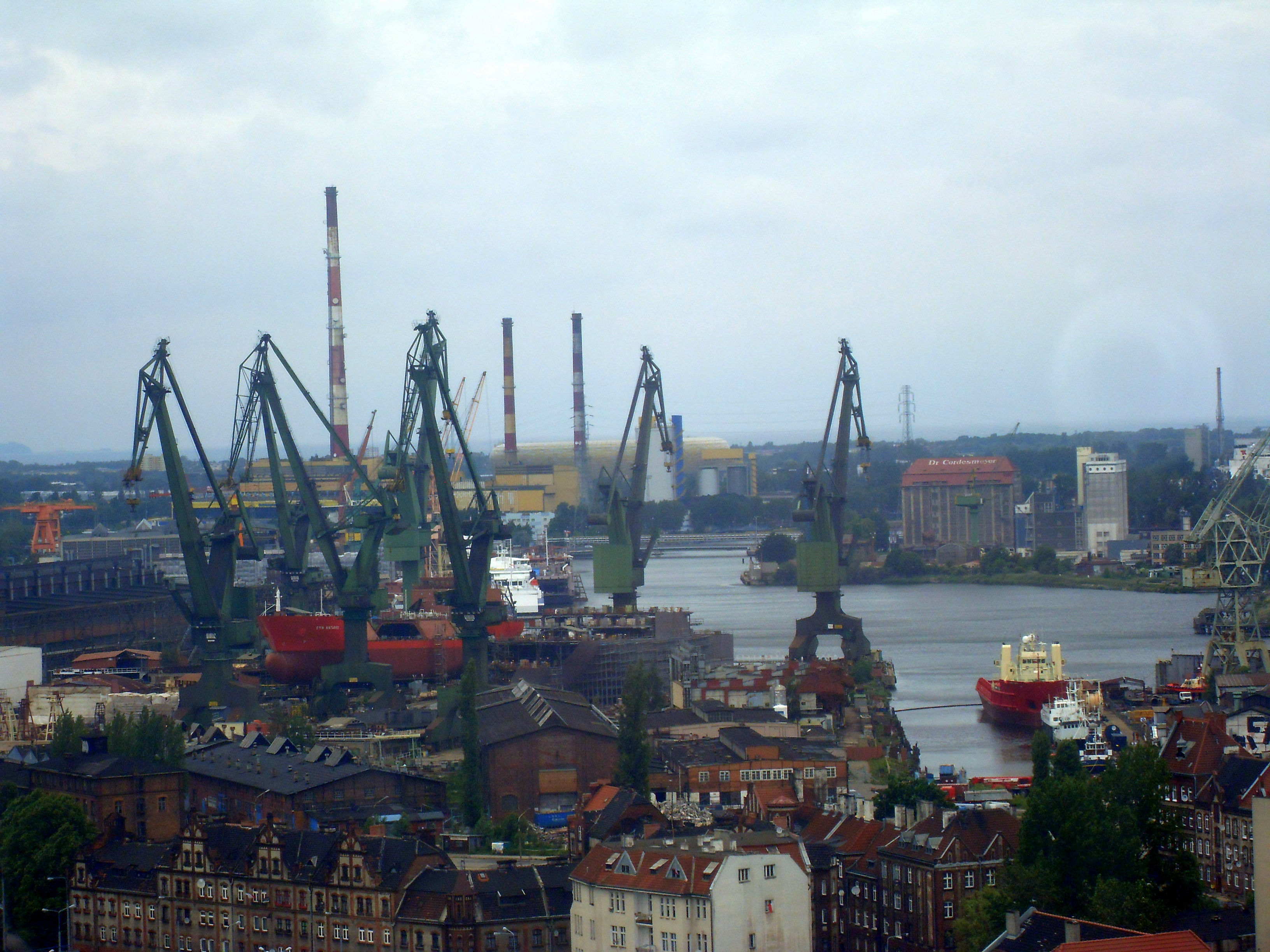 Gdańsk - Stocznia i Martwa Wisła